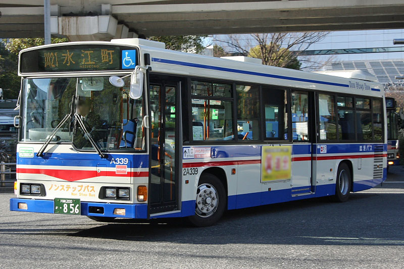 Kawasaki Tsurumi Rinko Bus's route bus (Car No.2A339 / Hino Rainbow BDG-HR7JPBE / J-BUS body) at Kawasaki Station East Exit, Kawasaki-ku, Kawasaki, Kanagawa, Japan